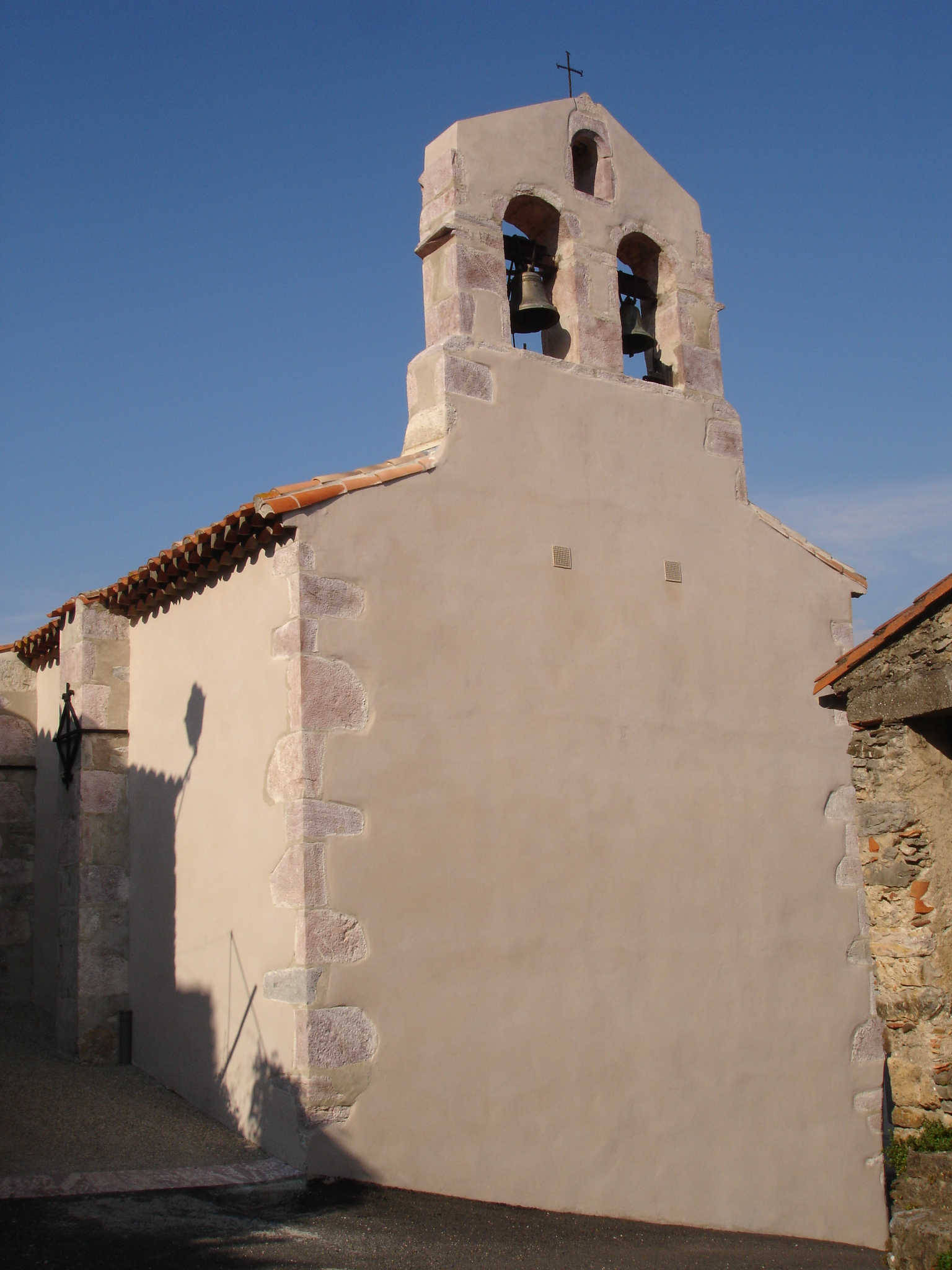 France, Aude (11), Montjoi, église